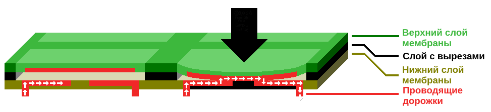 Устройство мембранной клавиатуры